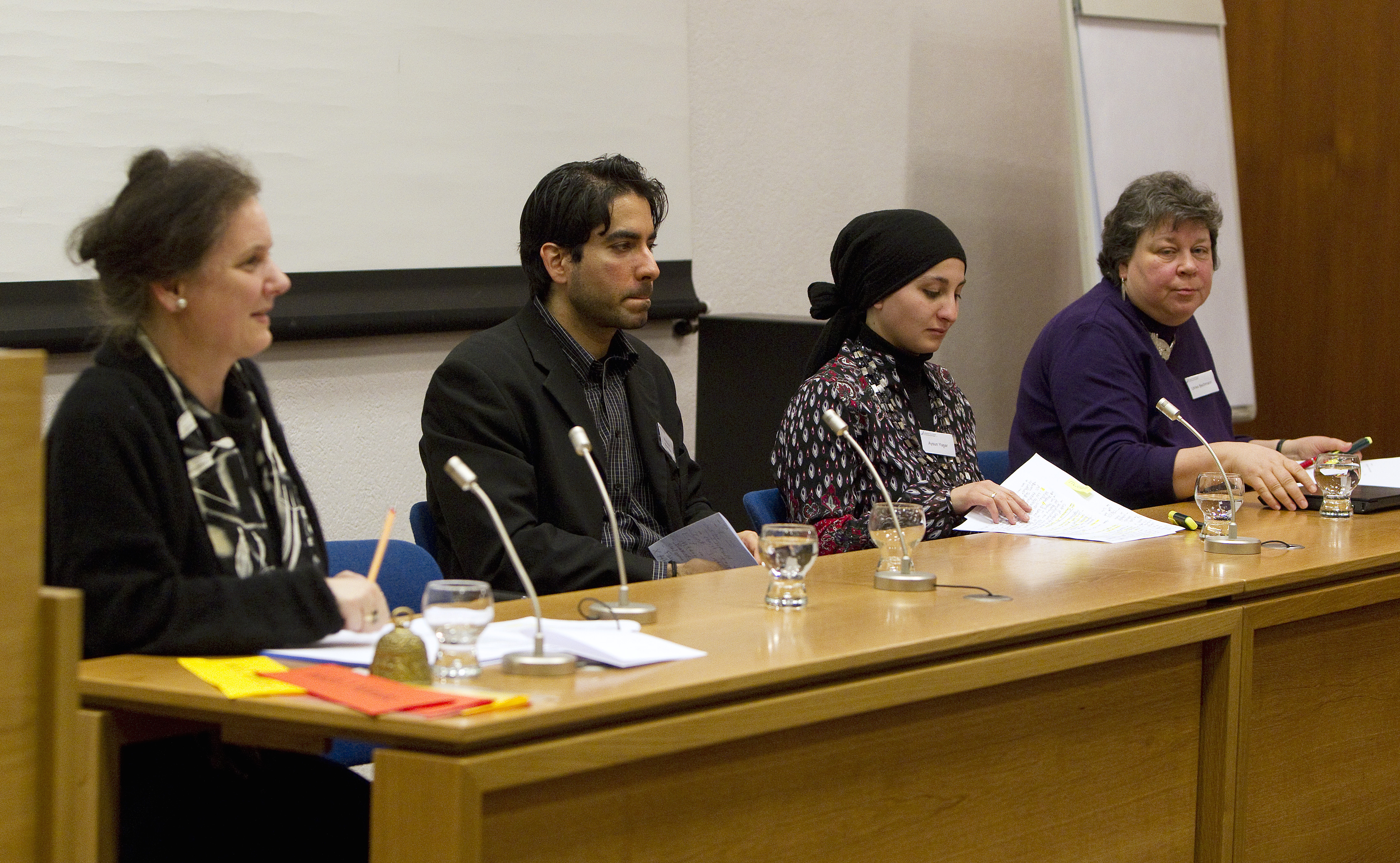 Podiumssitzung beim Theologischen Forum Christentum - Islam 2010 ("Zeugnis, Einladung, Bekehrung. Mission in Christentum und Islam"). Von links: Dr. Jutta Sperber, Prof. Dr. Mouhanad Khorchide, Aysun Yasar, Prof. Dr. Ulrike Bechmann.